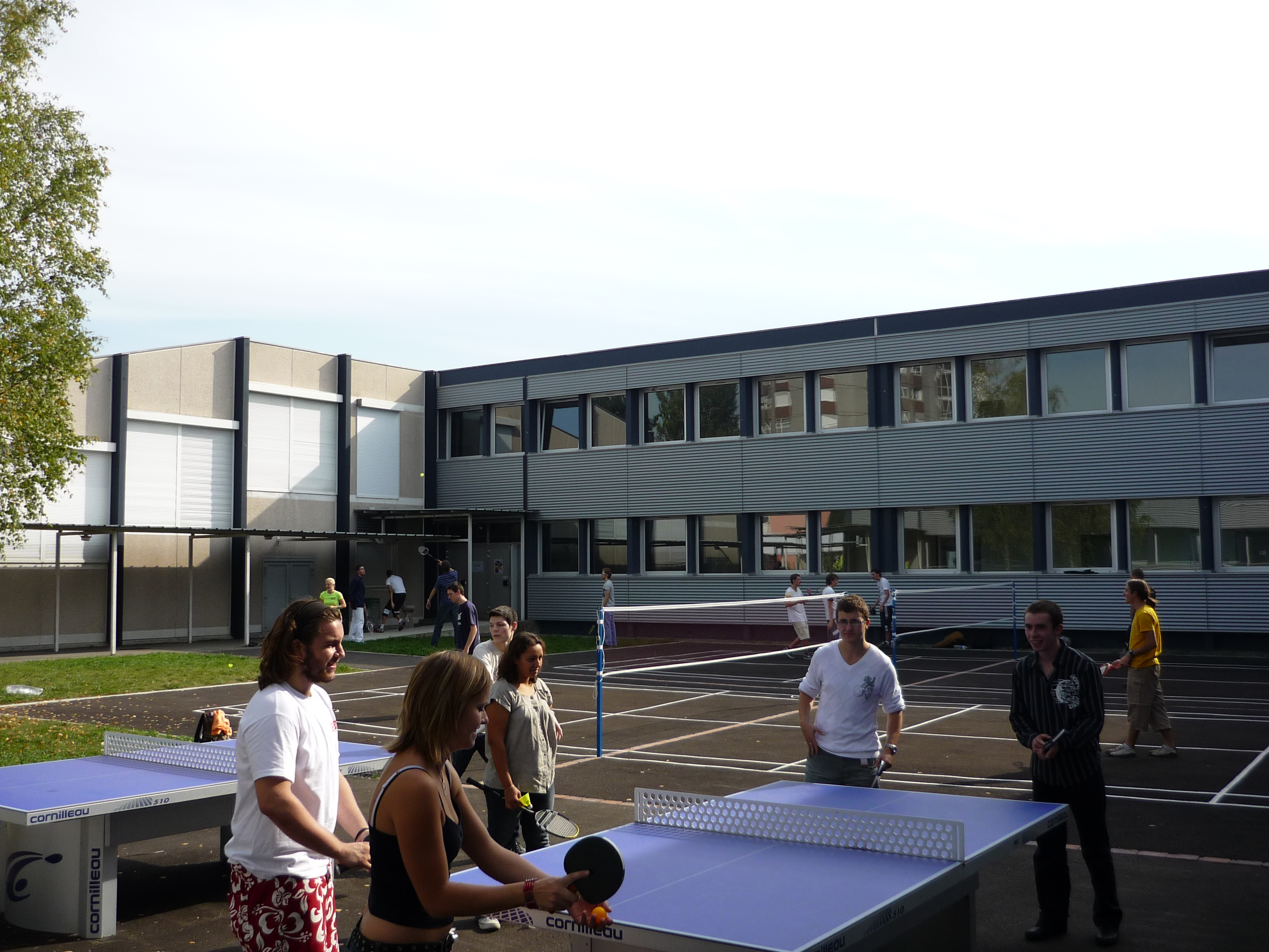 Infrastructures sportives (badminton et ping-pong) pour les étudiants de l'IUT Mulhouse. Photo réalisée lors du Derby Inter-Départements le 24 septembre 2009